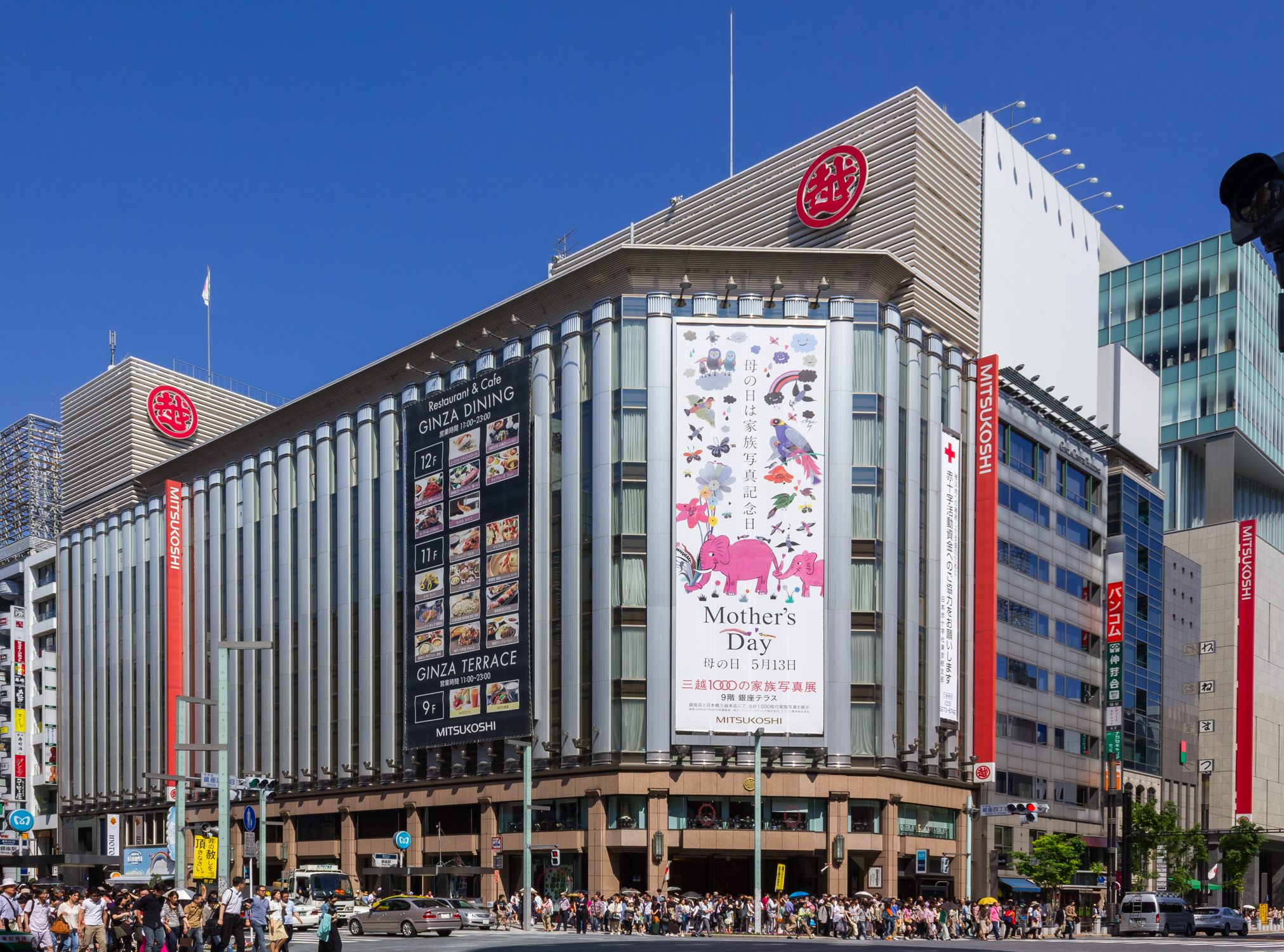 三越銀座店（東京都中央区）